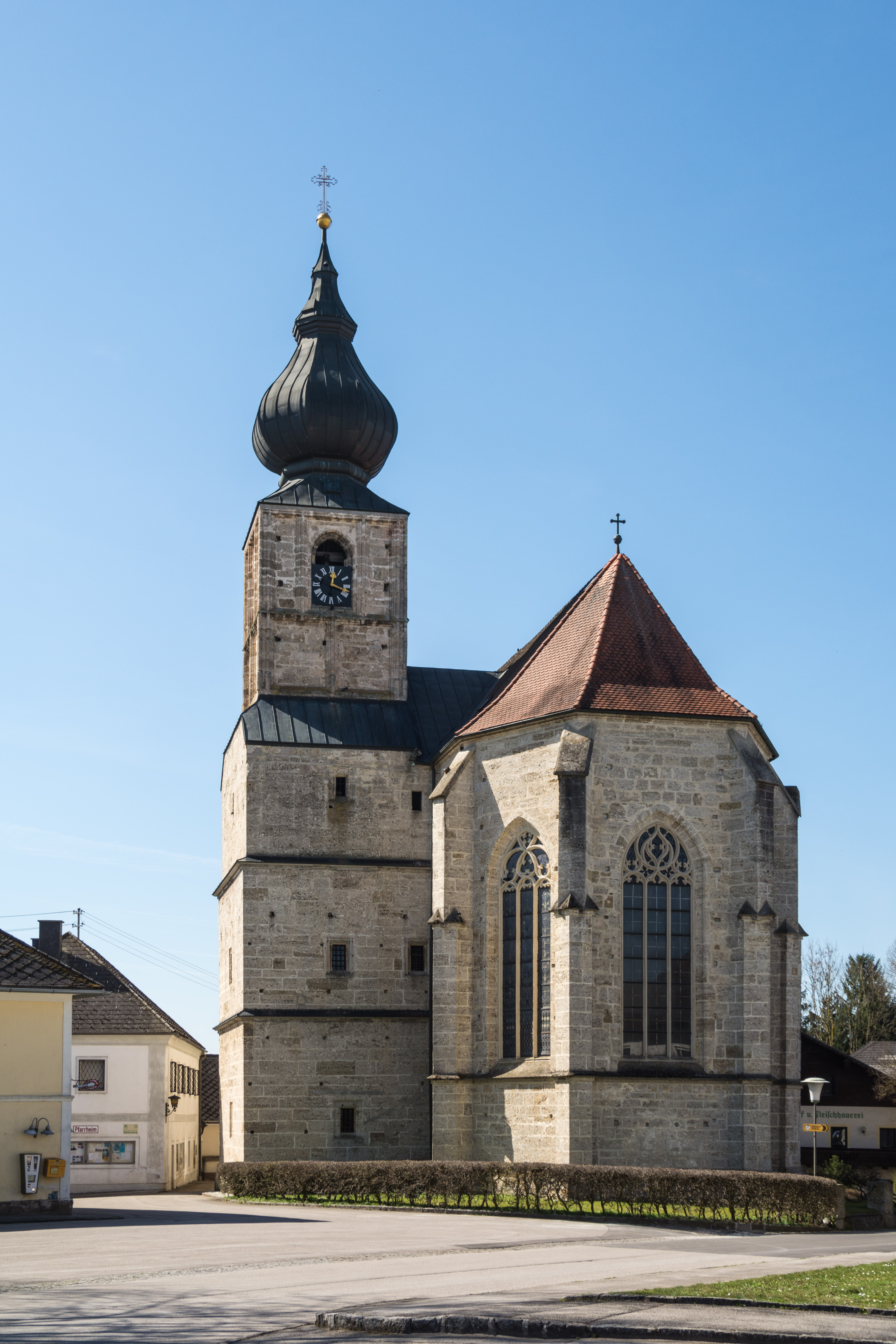 Kath. Pfarrkirche, Wallfahrtskirche Sieben Schmerzen Mariä